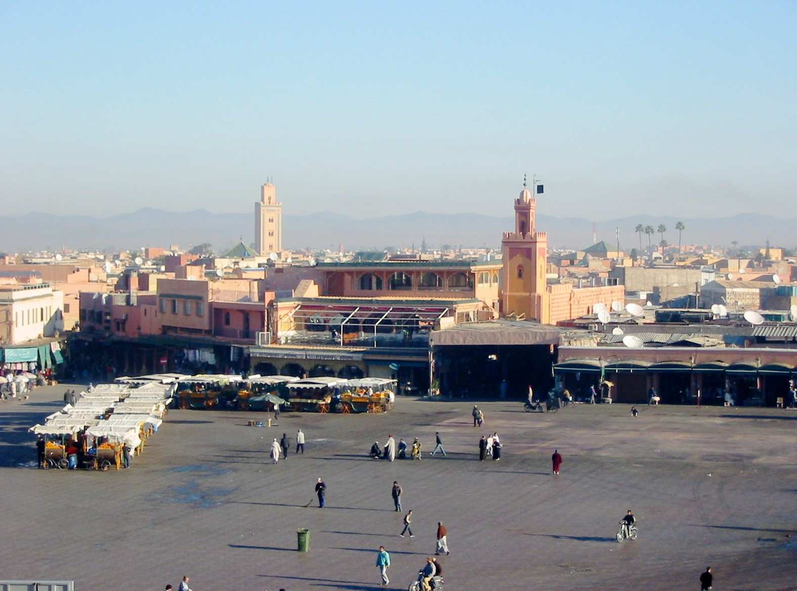 Djemaa el Fna, morning